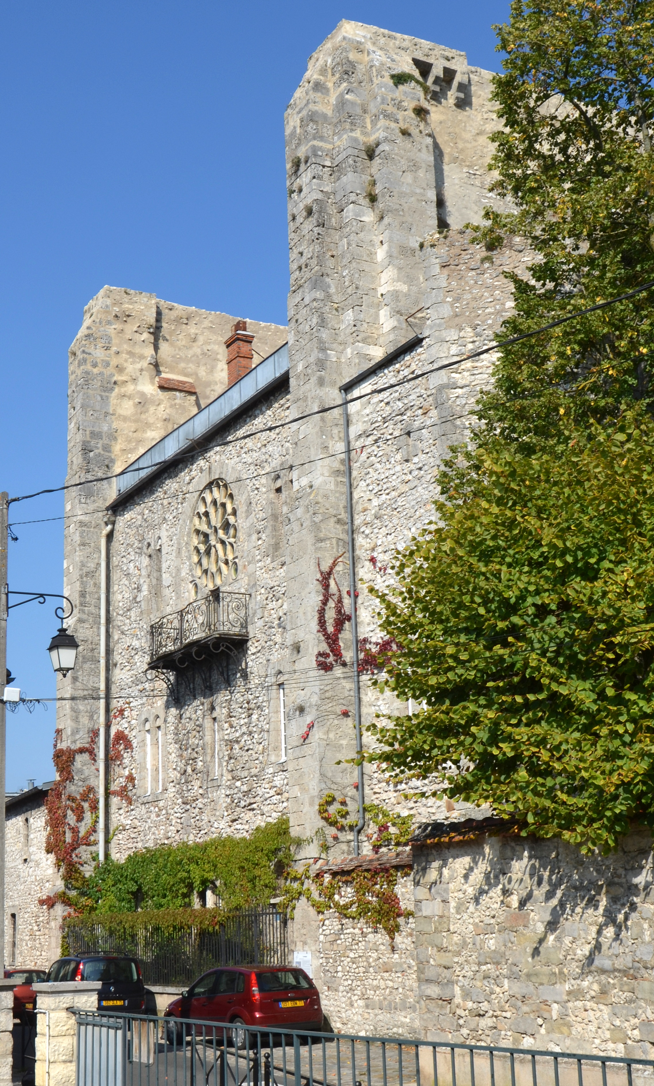 Chateau de Moret a Moret sur Loing (Seine et Marne, France). 12e et 17e siècle